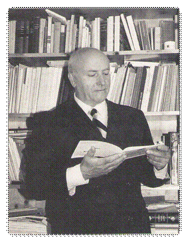 Fotocopia di una foto di W. Belardi presa da un libro a stampa